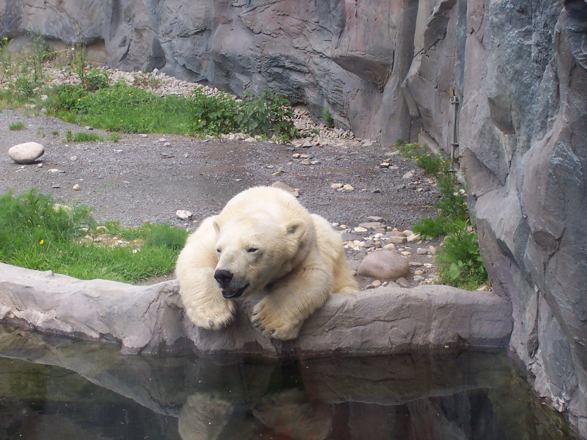 Polar Bear (Ursus maritimus) in ZOOM Erlebniswelt, Gelsenkirchen, Germany